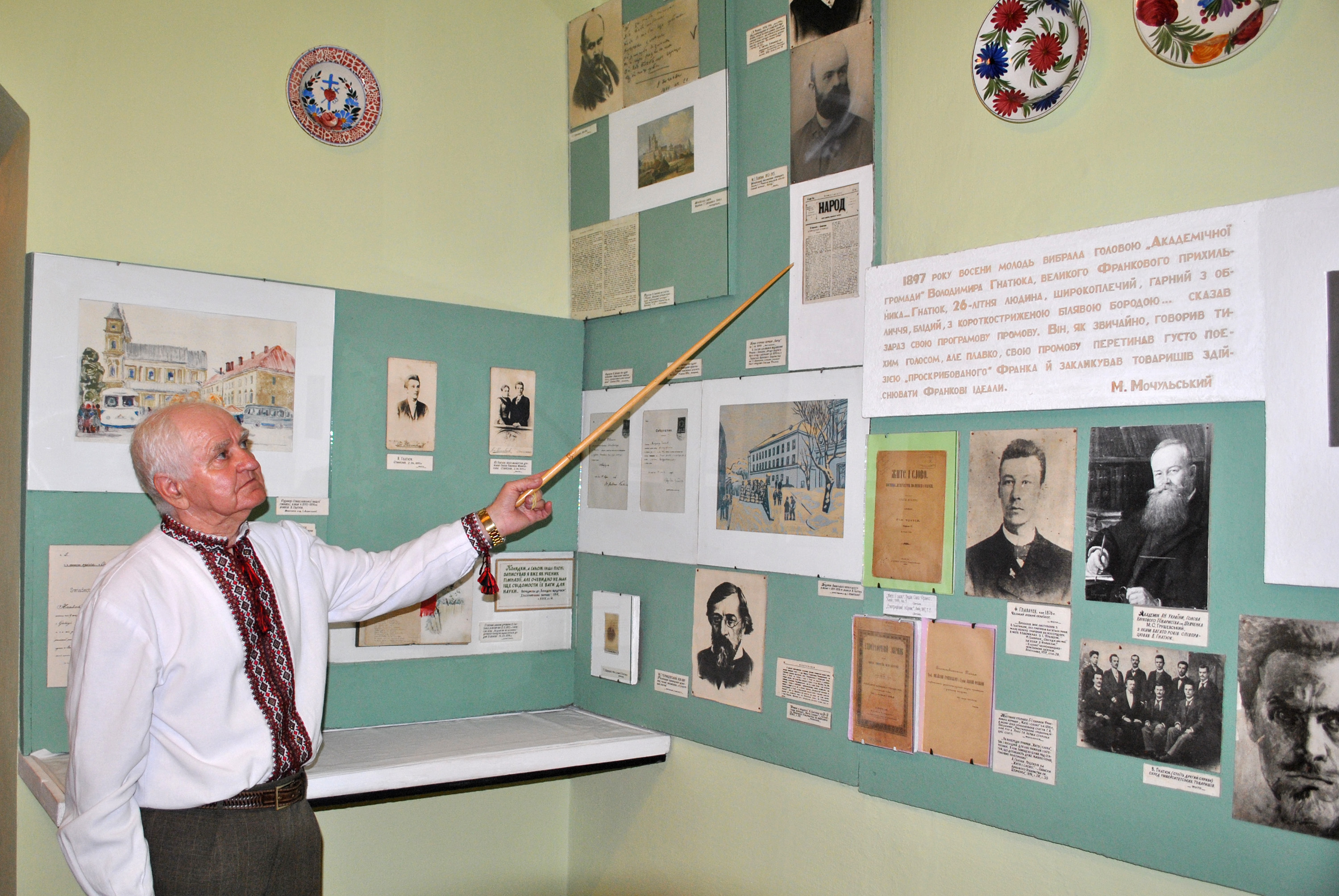 Український краєзнавець, етнограф, літературознавець, громадський діяч Остап Степанович Черемшинський проводить екскурсію в музеї Володимира Гнатюка у Велесневі Монастириського району Тернопільської області.